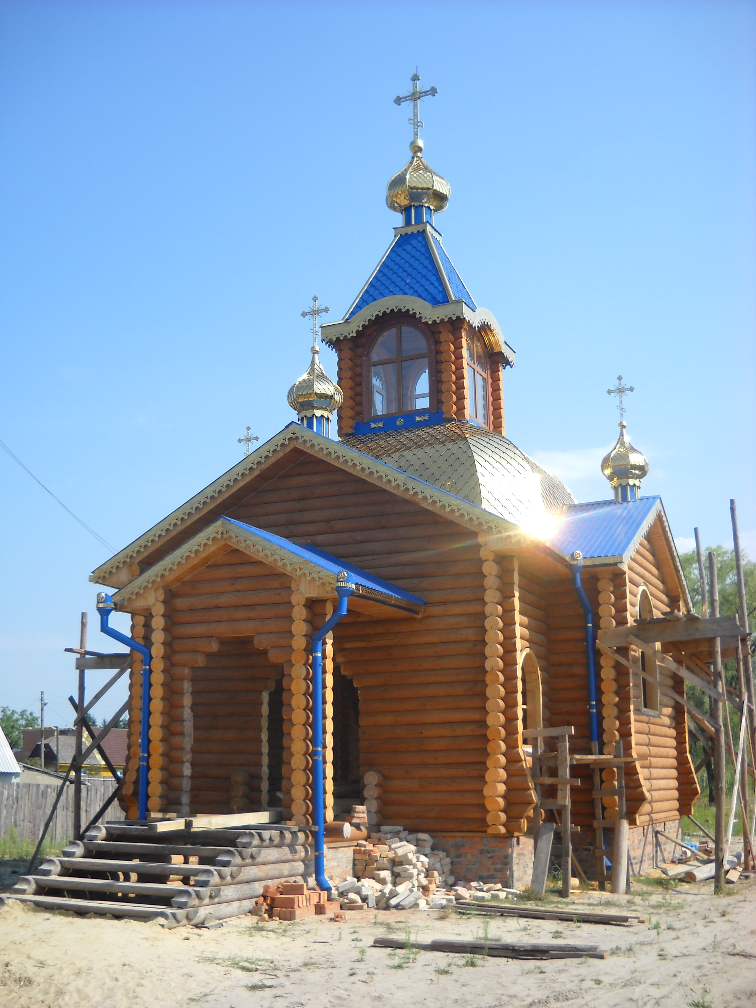 Cerkiew św. Anatola Kowelskiego w Kowlu, ul. Brzeska